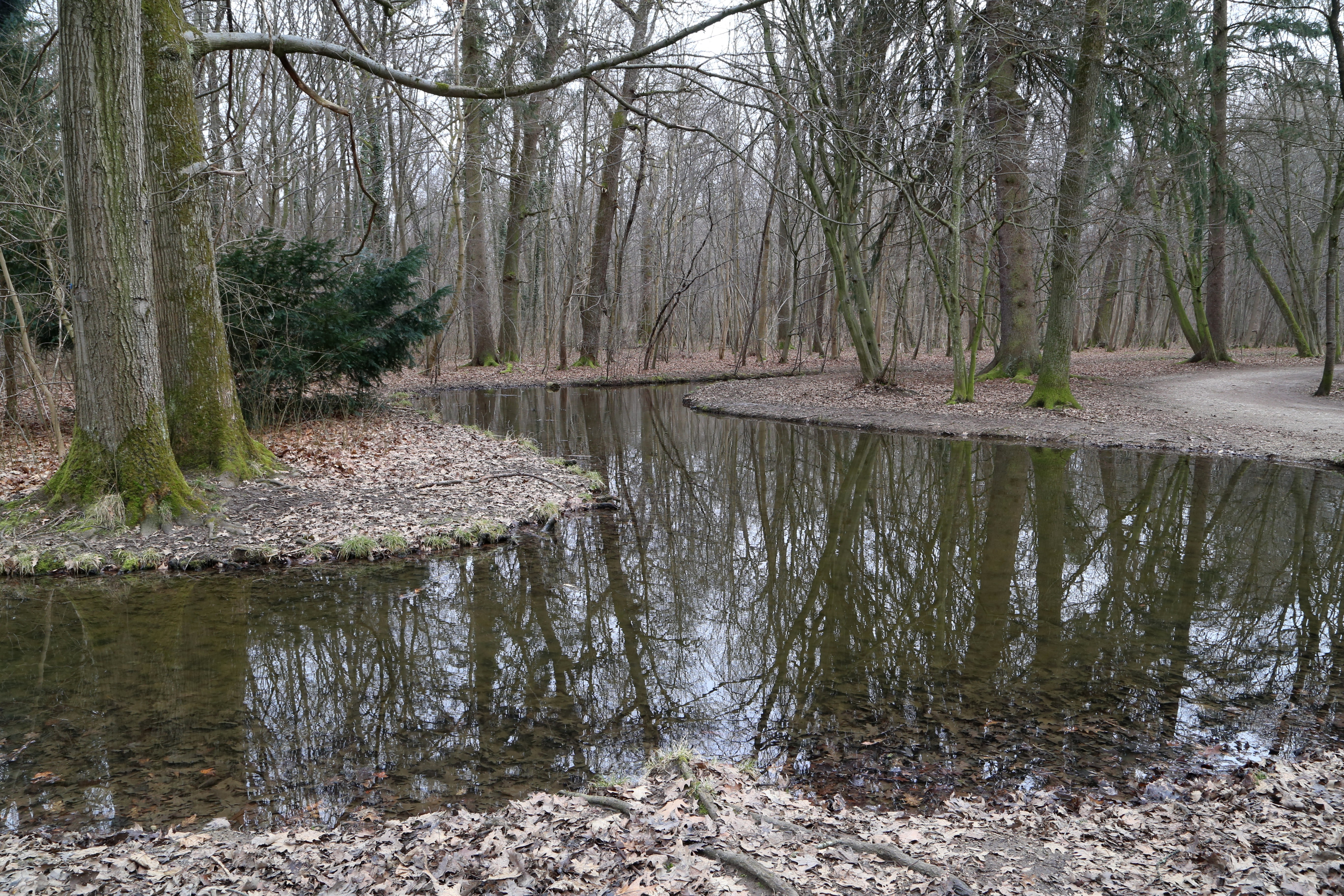 Hartmannshofer Bach im Hartmannshofer Park, München; LSG-00120.07